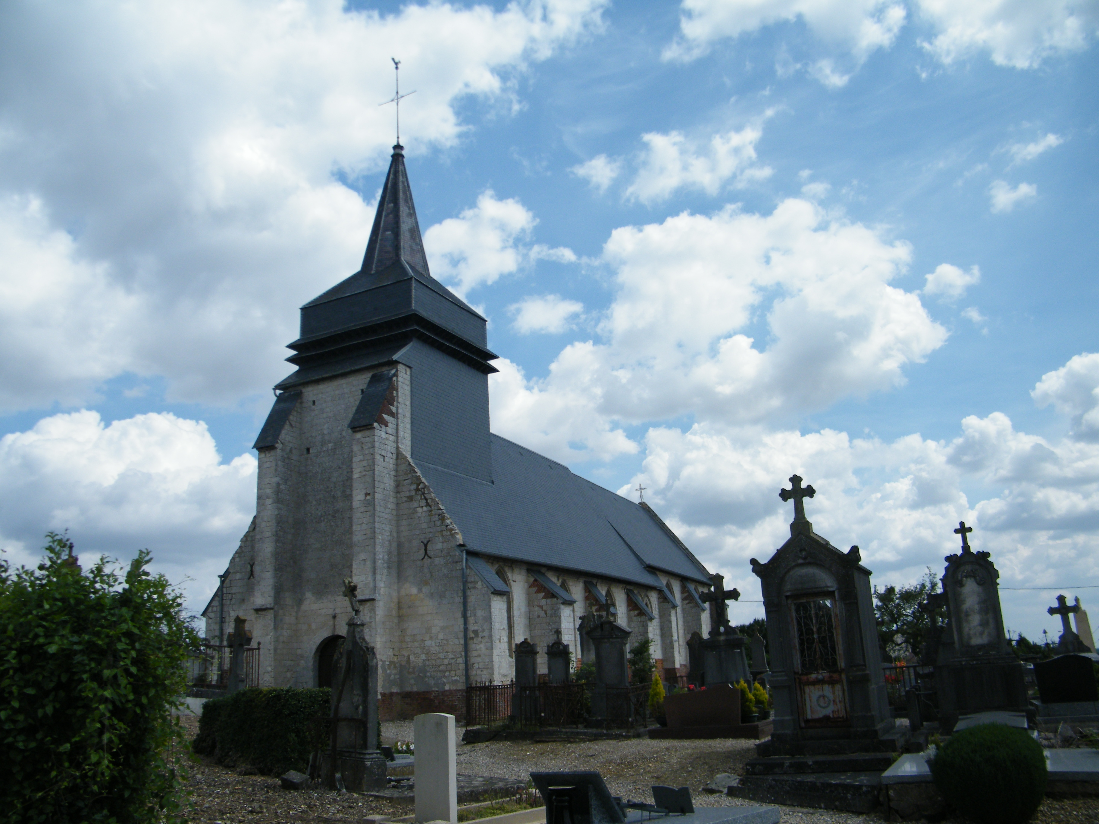 église.